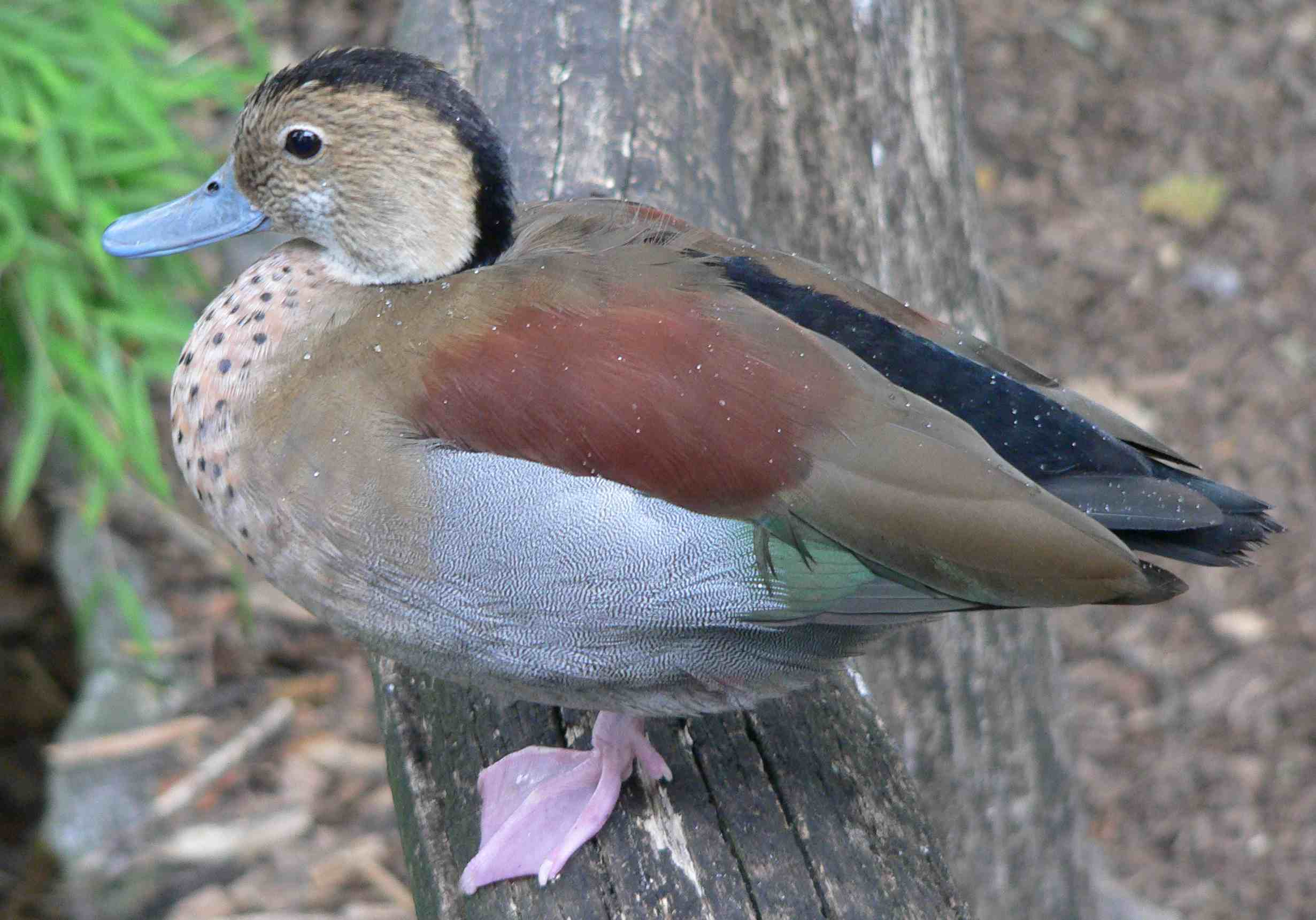 Anas leucophrys